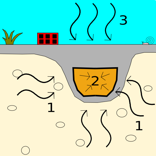 Tipos de radiación ionizante que recibe una cerámica en un yacimiento arqueológico: 1. Radiación radiactiva emitida en el entorno 2. Radiación radiactiva emitida dentro de la misma cerámica 3. Rayos cósmicos